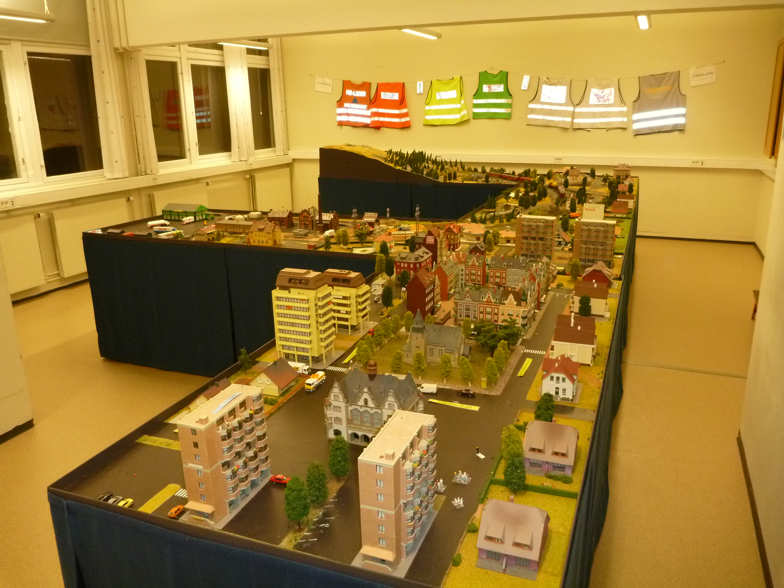 Smalvik - Øvelsesområde - Modellen står på Sivilforsvarets beredskaps- og kompetansesenterpå Starum